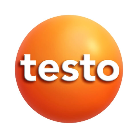 logo von testo